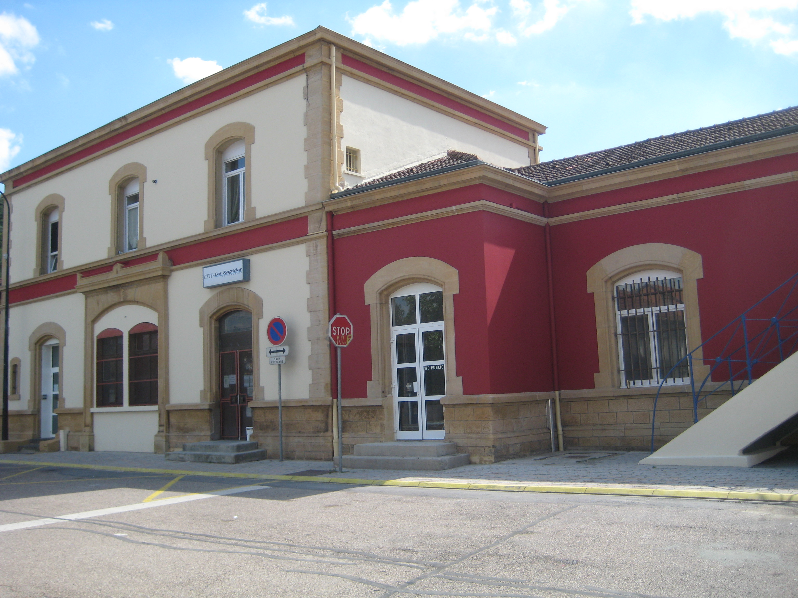 Description gare Moyeuvre Date25 August 2011Sourcemon appareil photoAuthorAimelaimePermission (Reusing this file) gare Moyeuvre